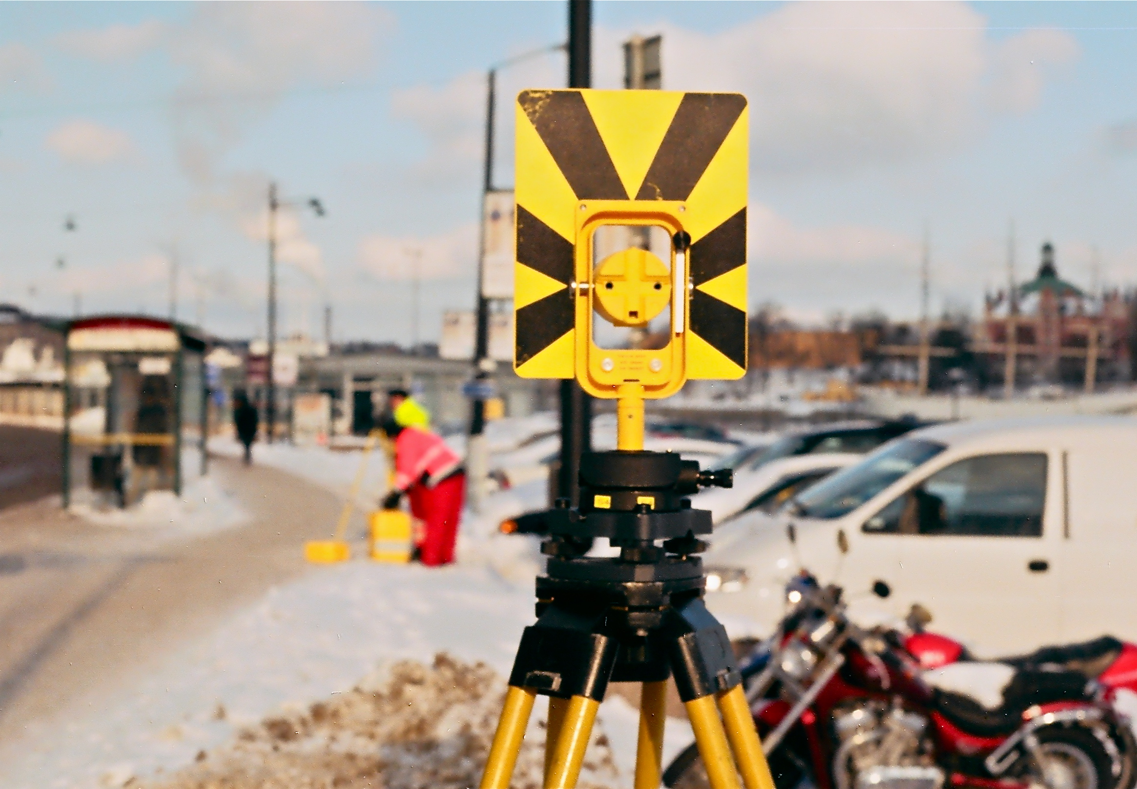 Prismastången till en totalstation.